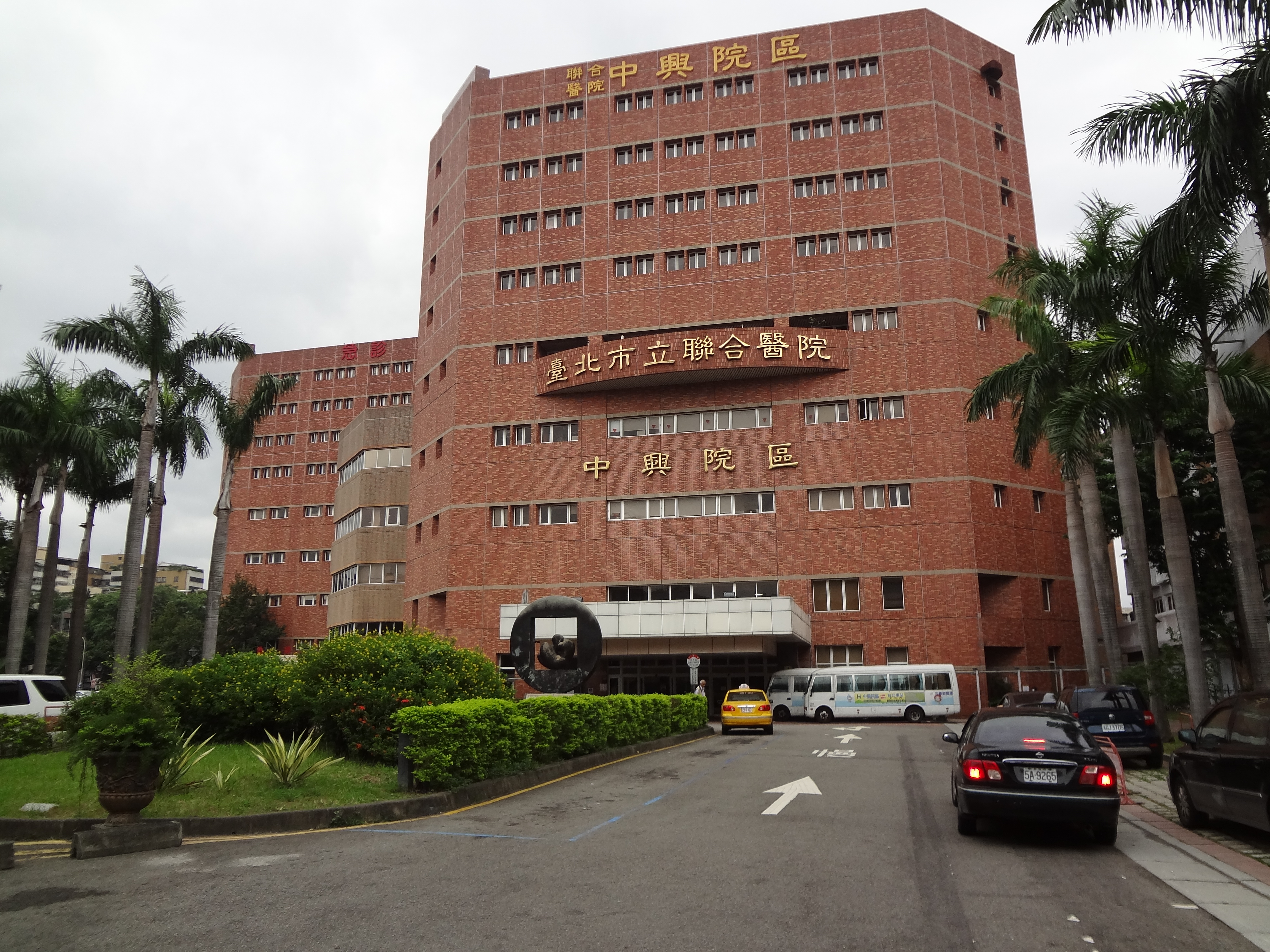 臺北市立聯合醫院中興院區。